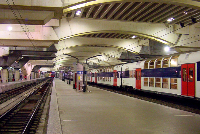 Paris Gare Montparnasse coté Banlieue